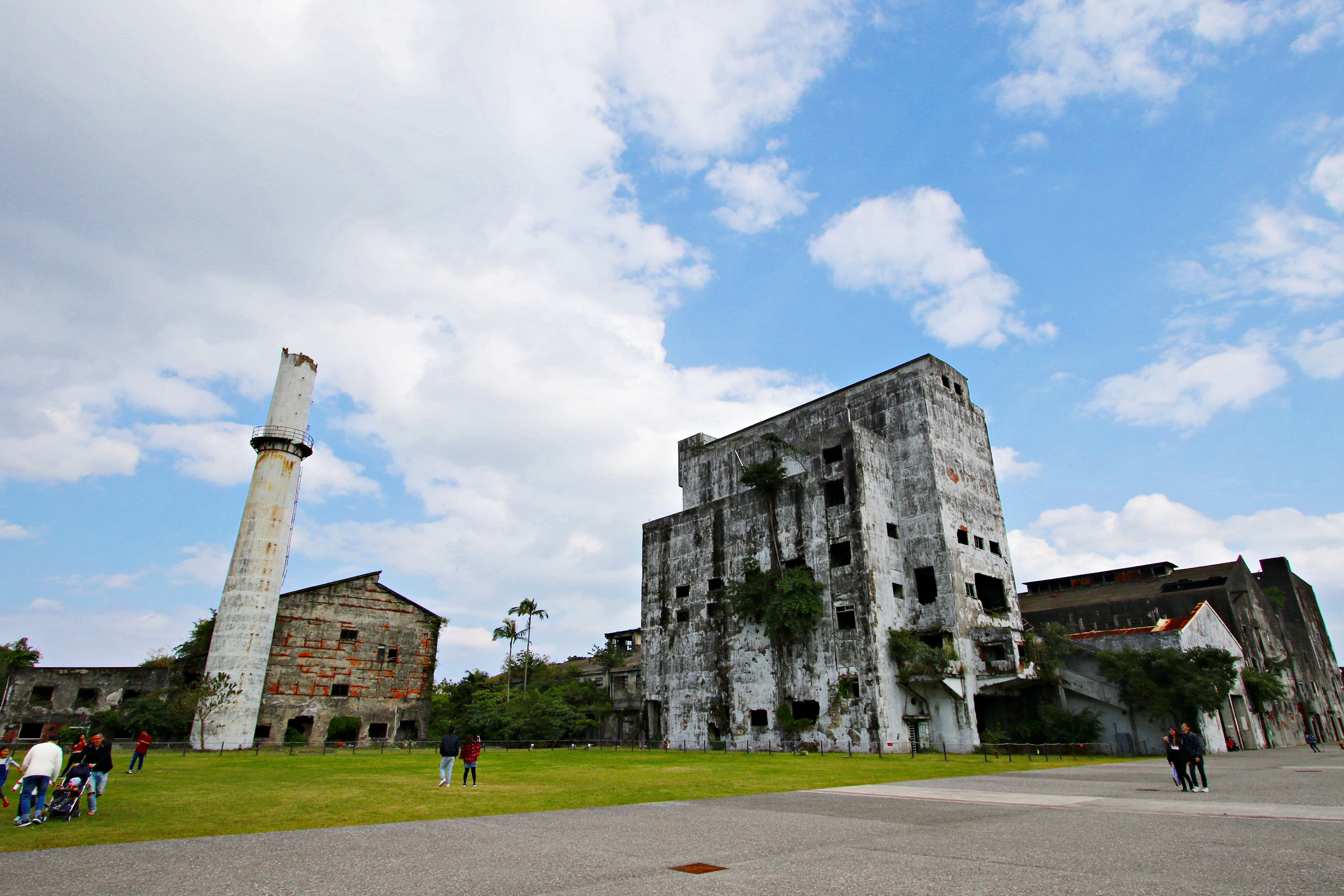 前身為中興紙廠的中興文創園區